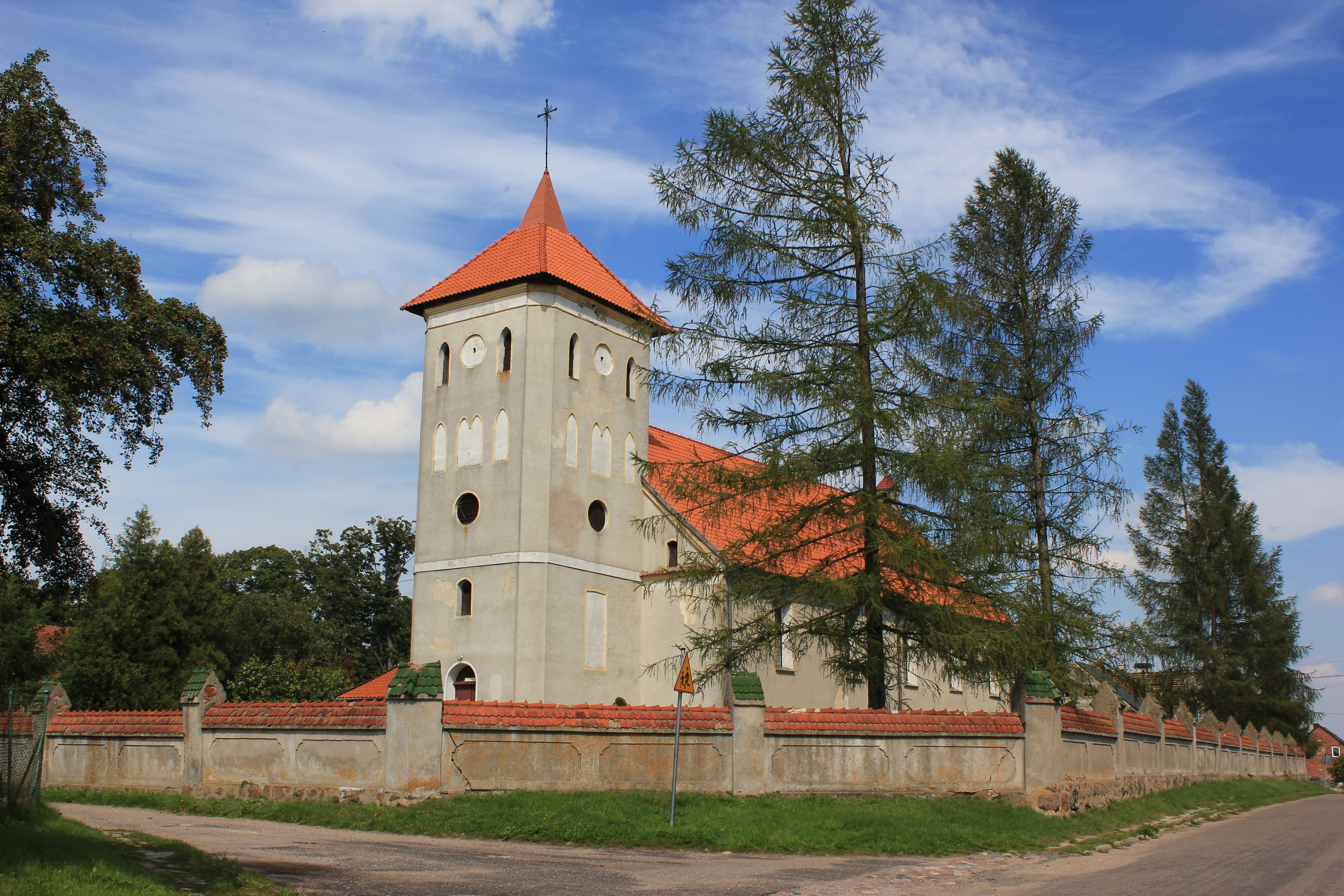 Hornjoserbsce: Cyrkej swj. Mikławša w Lamkowje, Pólska.